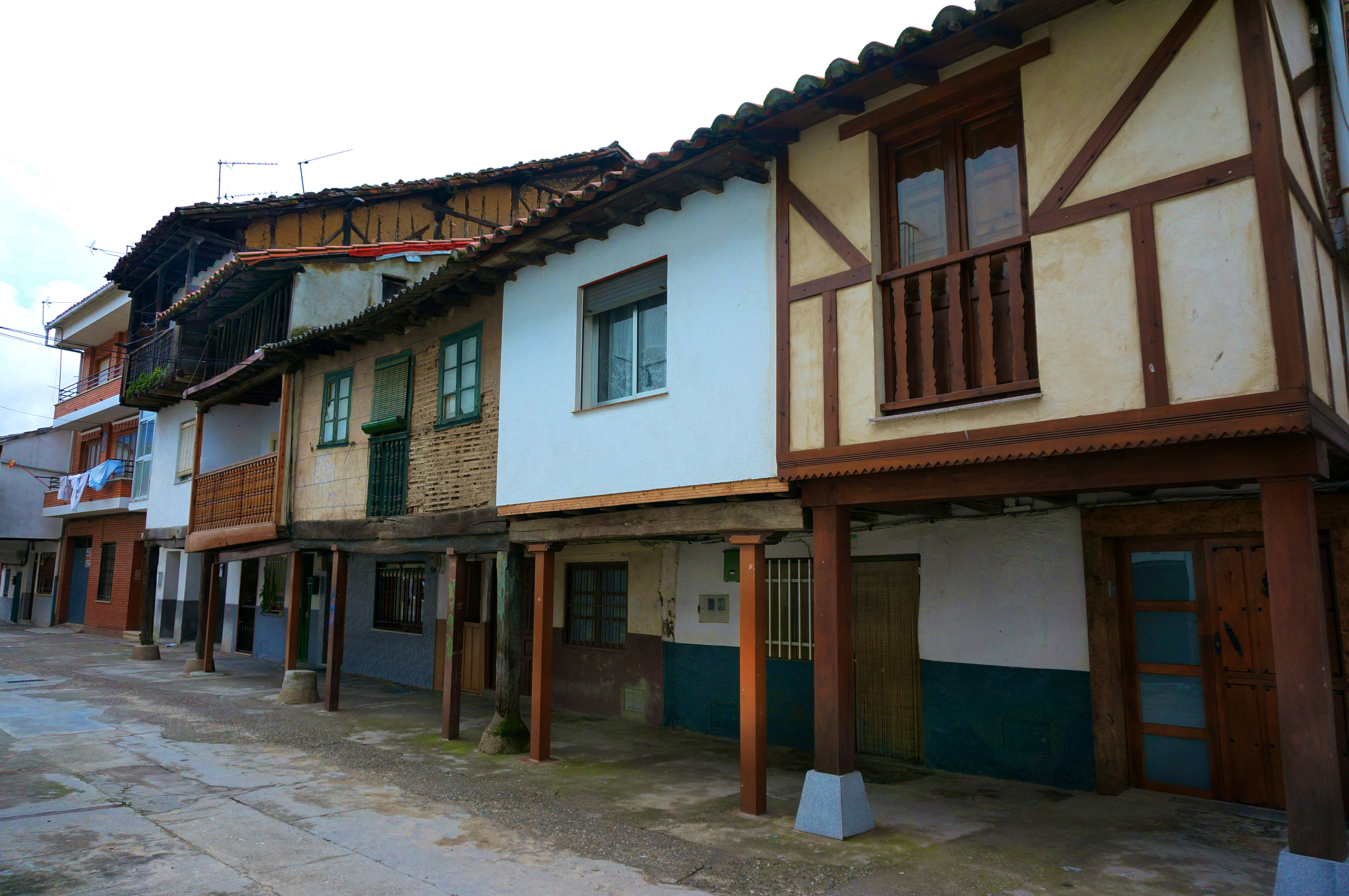 Casas típicas en Navaconcejo, provincia de Cáceres, España